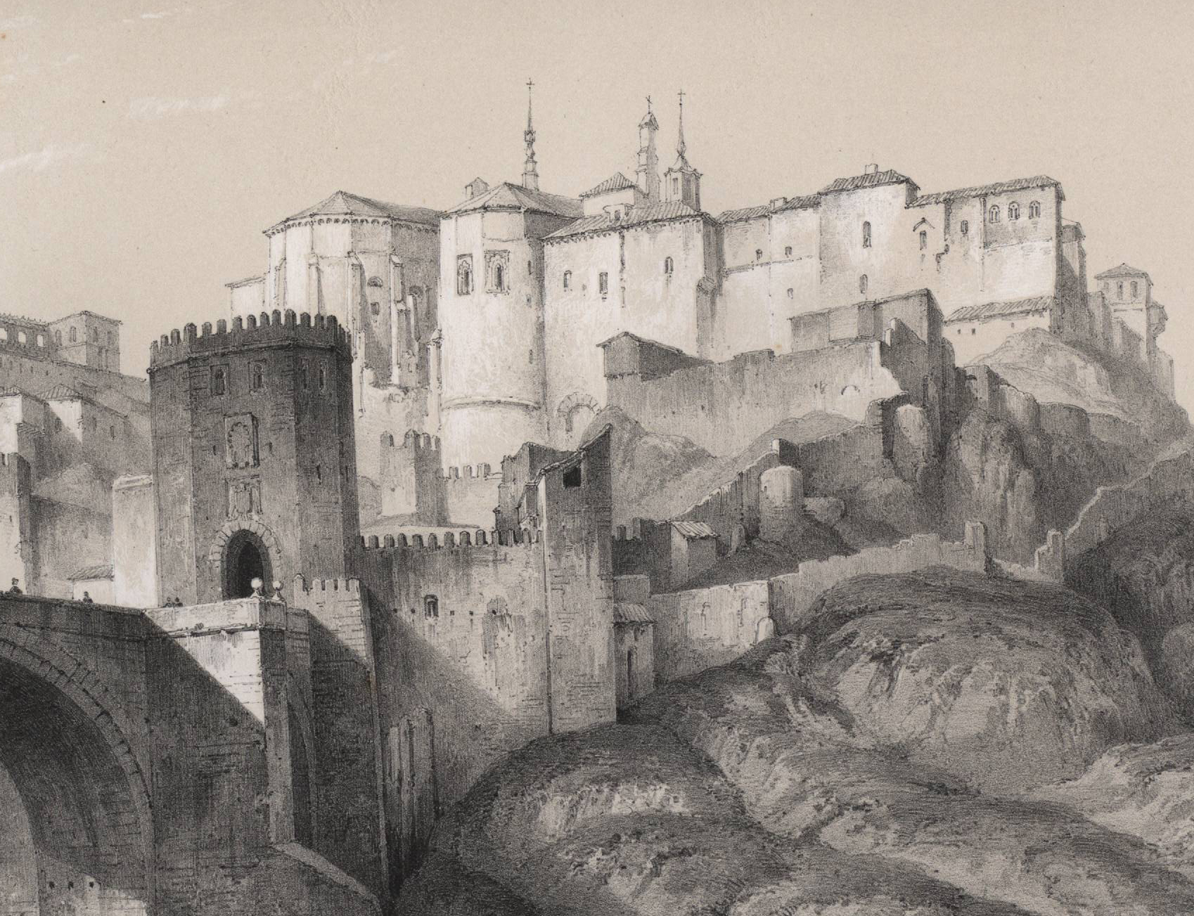 Puente de Alcántara, Alcázar y Convento de la Concepción Francisca.